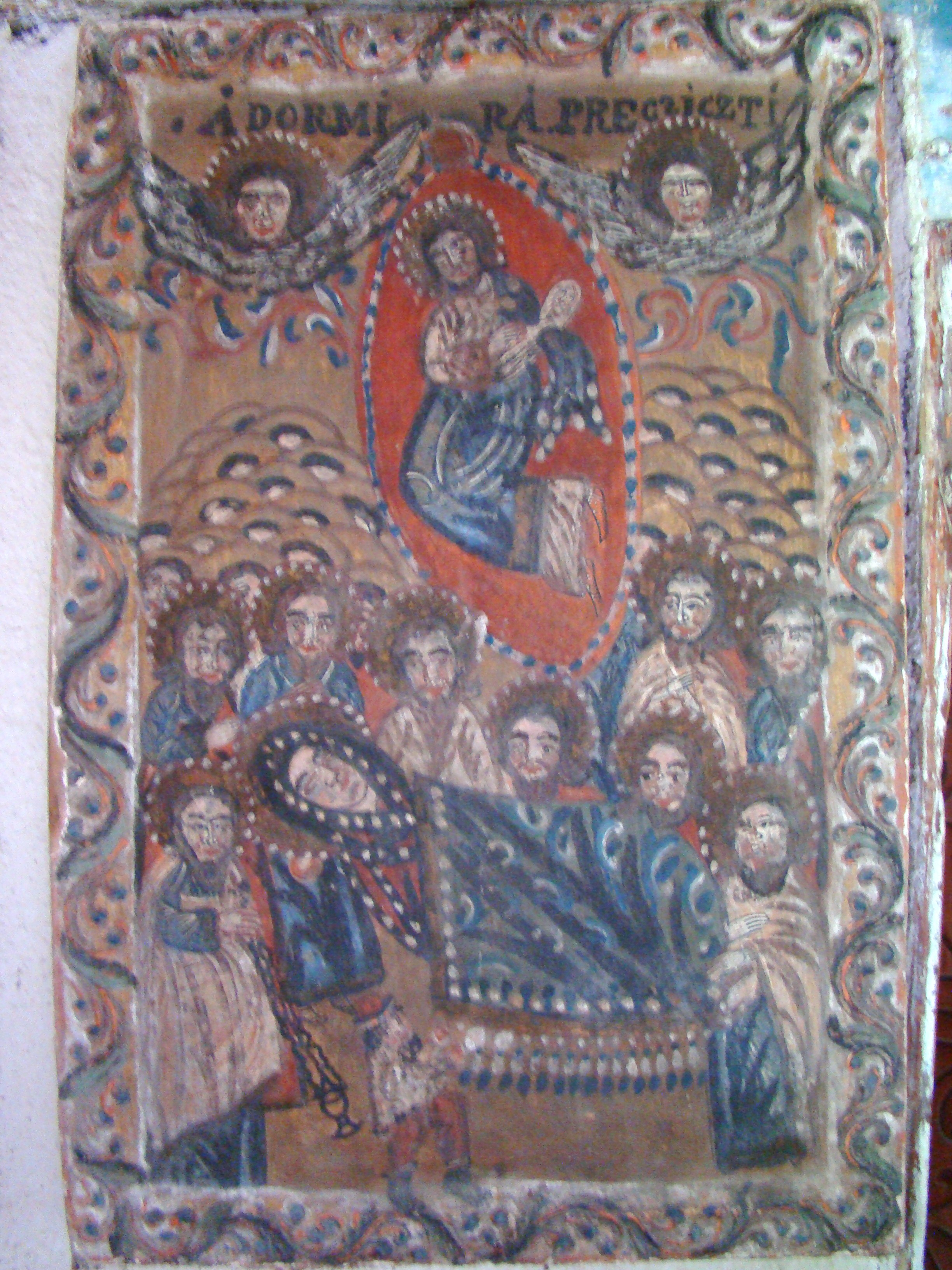 Biserica de lemn „Sf.Arhangheli” din Boiereni, județul Maramureș